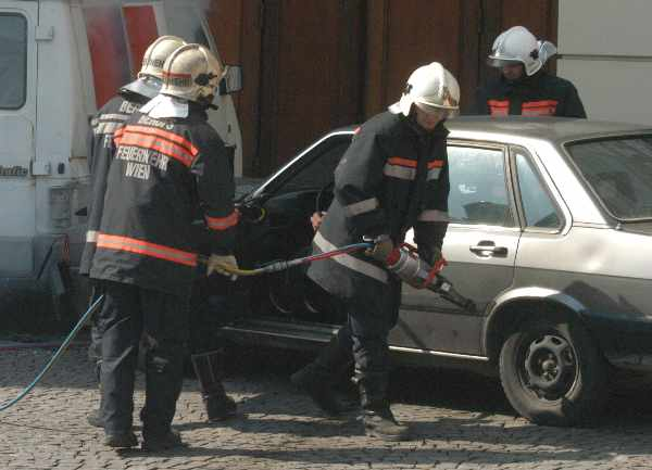 Wiener Berufsfeuerwehr bei Autounfall (gestellte Szene)